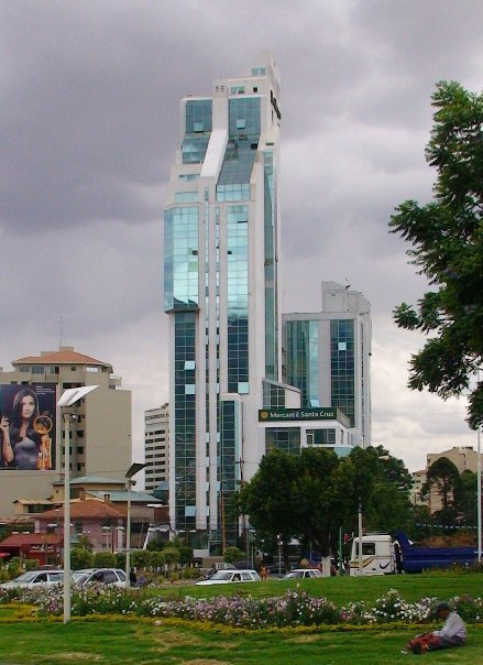 Vista del edificio del periodico Los Tiempos